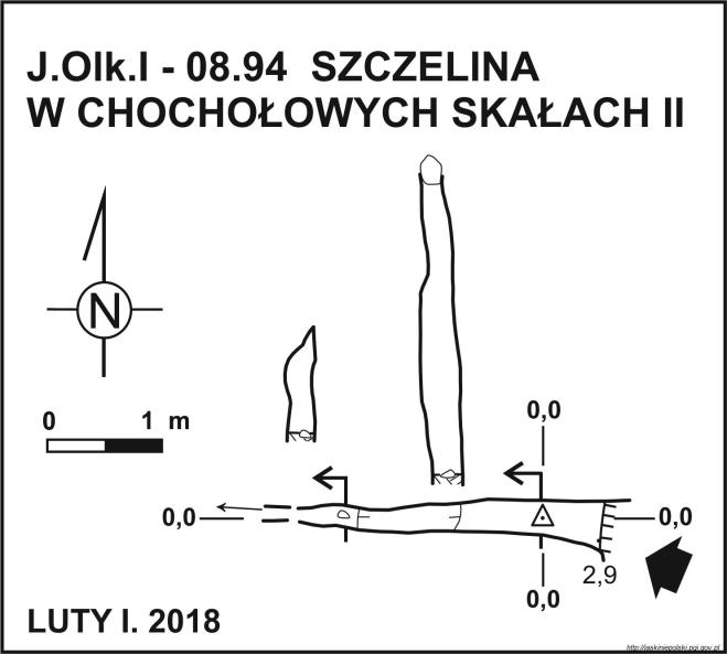 Szczelina w Chochołowych skałach II - plan